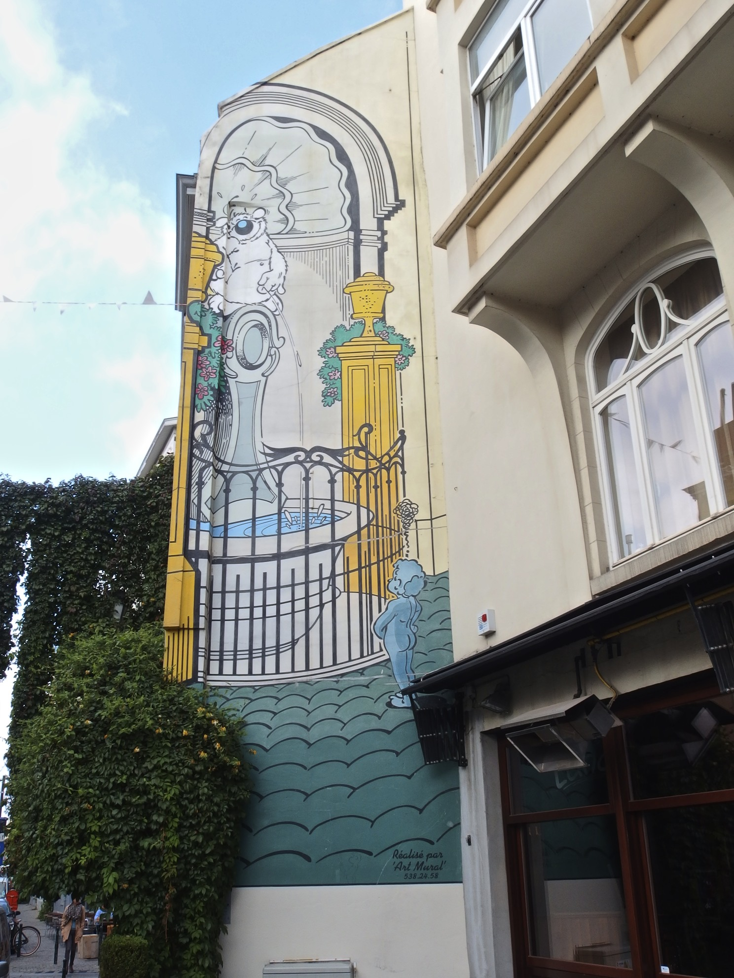 Cubitus-Comicwand in Brüssel, Rue de Flandre: Der Comic-Hund Cubitus hat den Platz des Manneken Pis eingenommen.